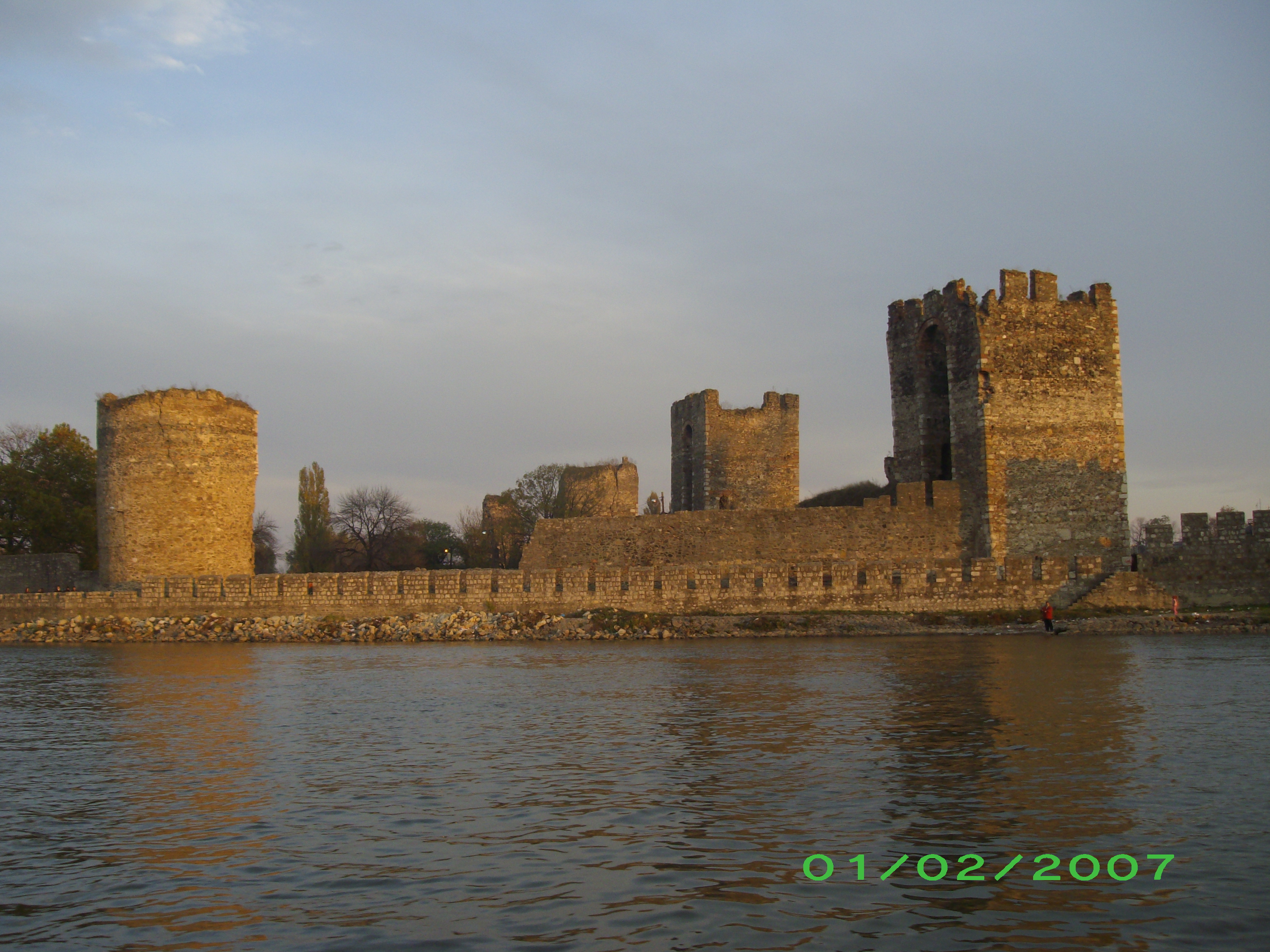 novembar 2010